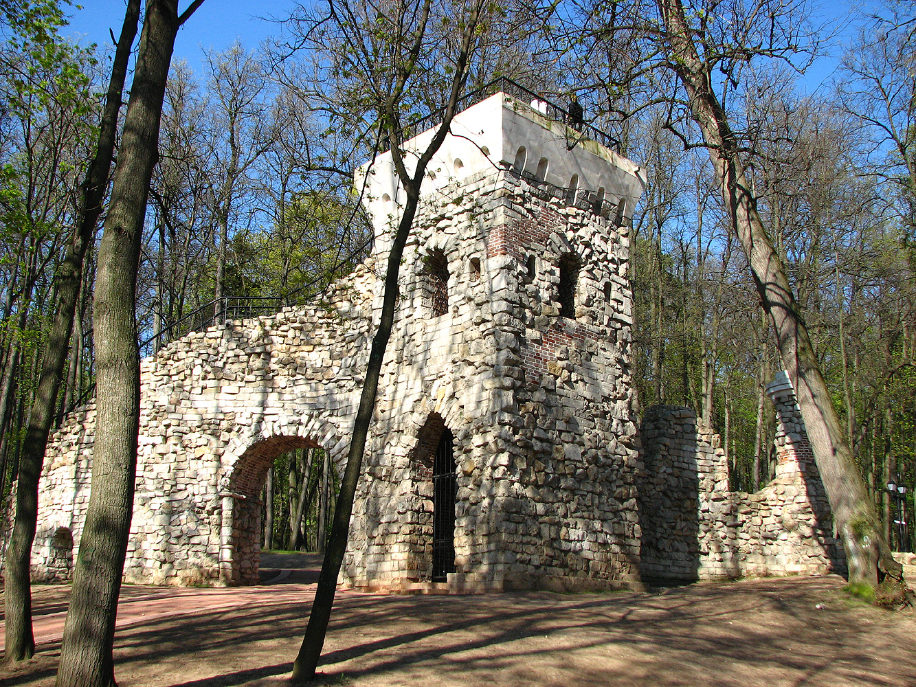 Башня-руина в Царицынском парке